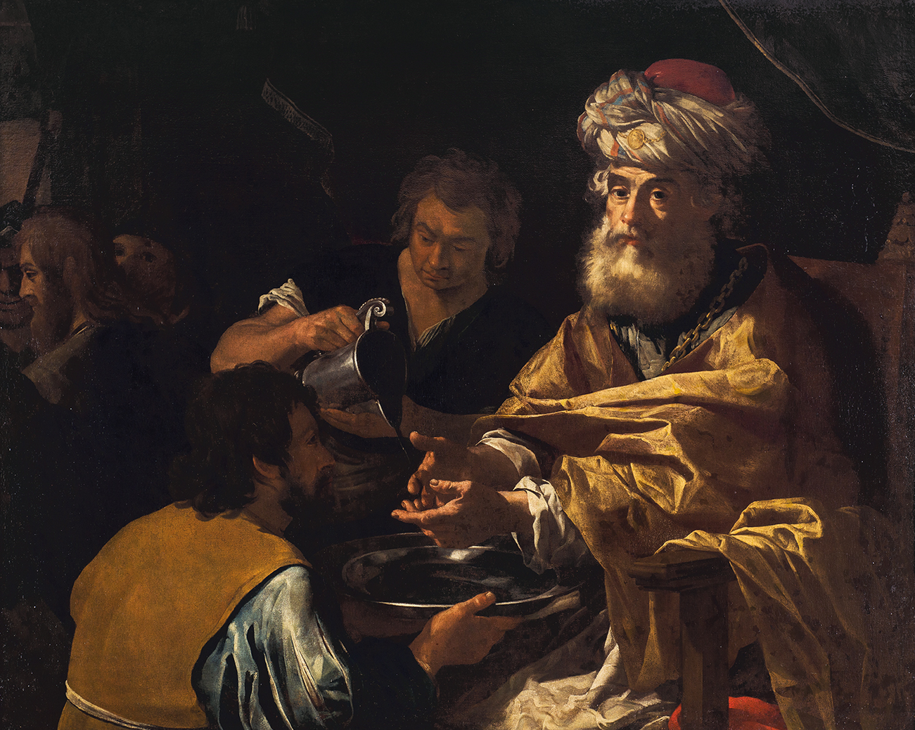 Ponzio Pilato si lava le mani